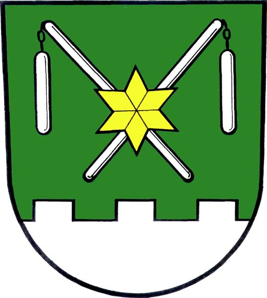 Znak obce Hradec-Nová Ves